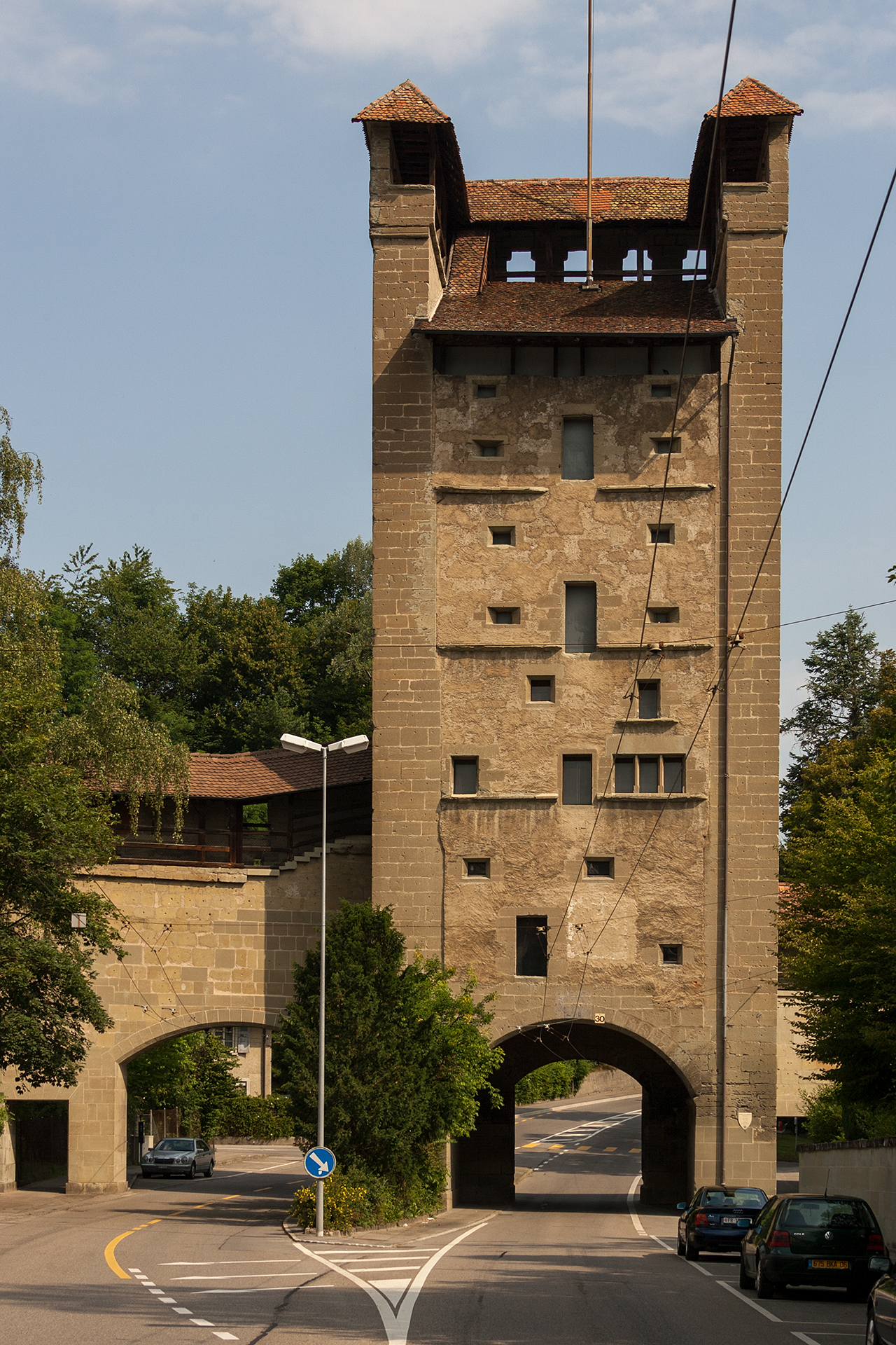 Murtentor in Fribourg